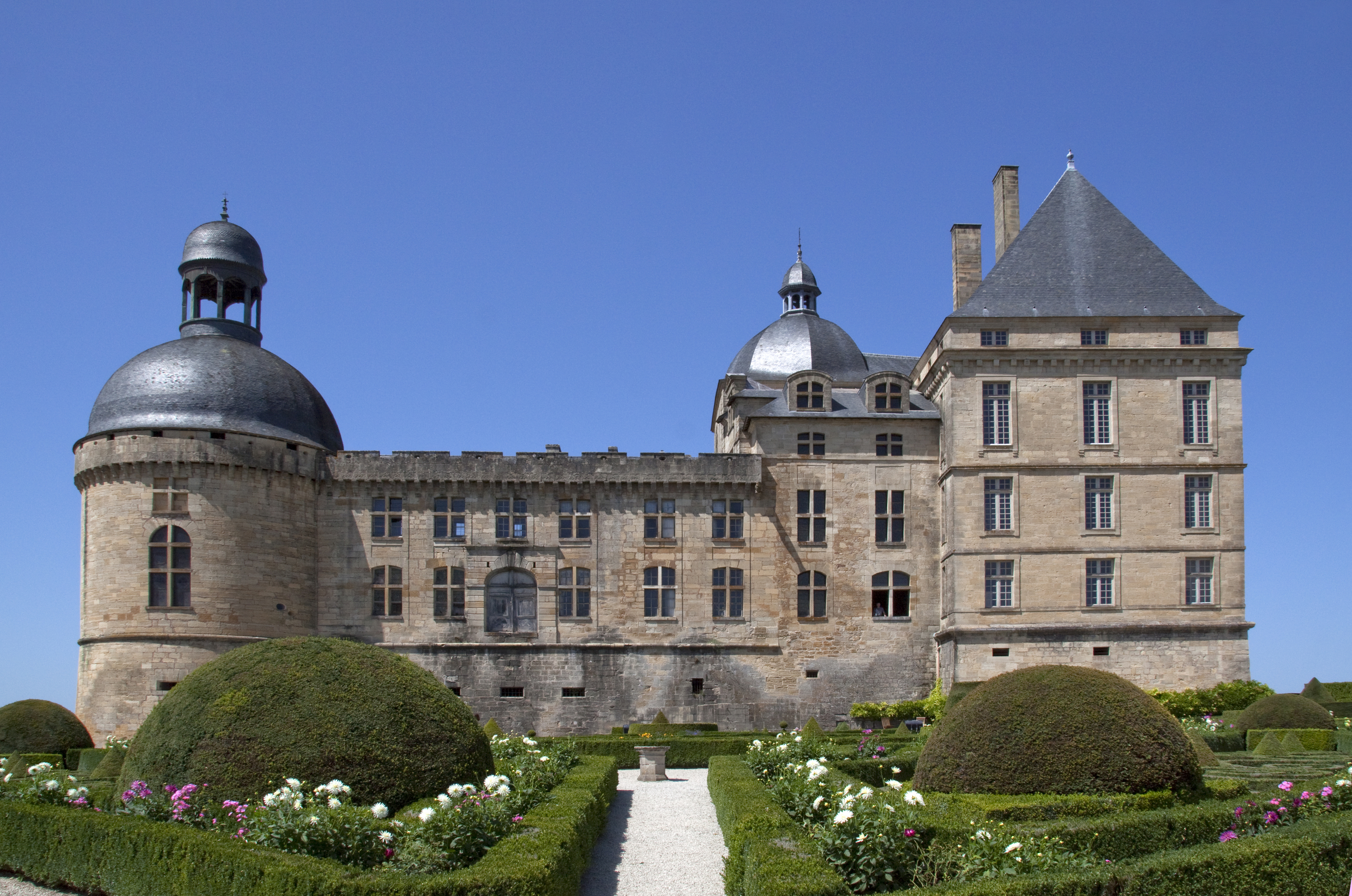 Schloss Hautefort